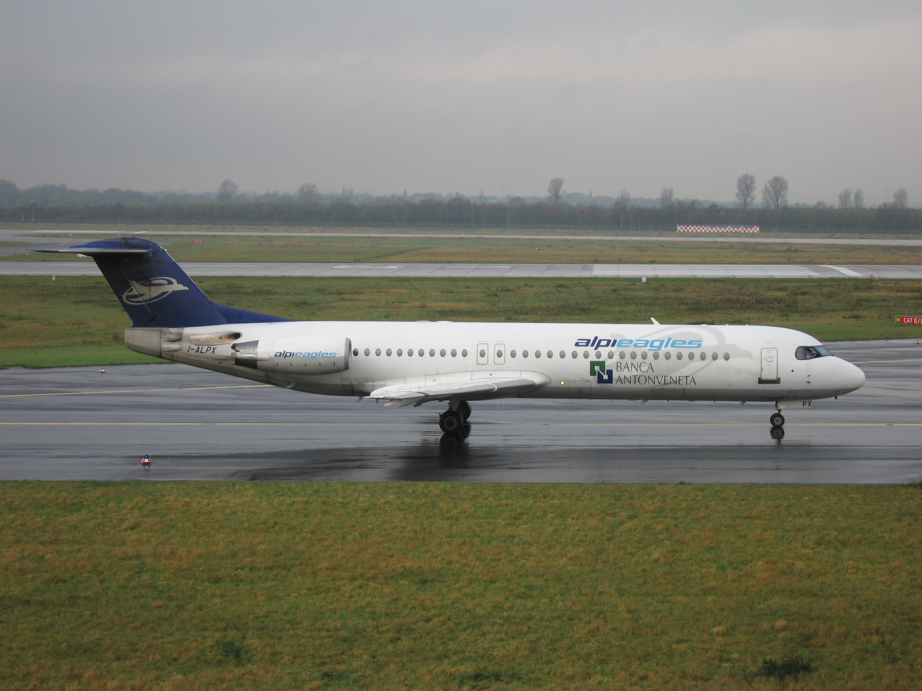 Fokker F100 (I-ALPX) der Fluggesellschaft Alpi Eagles